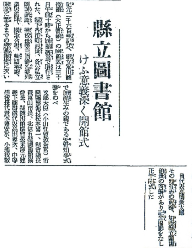 県立図書館けふ意義深く開館式